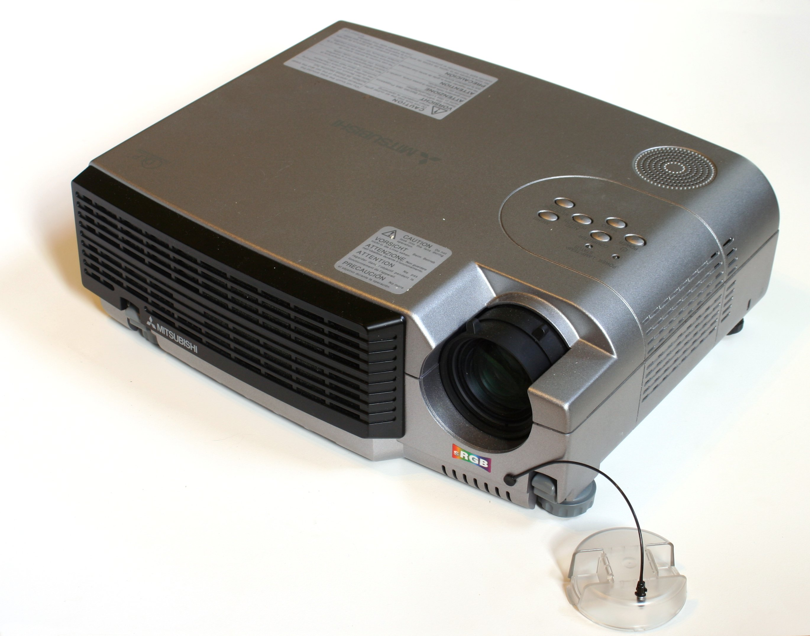 Mitsubishi Electric XD300U DLP video projector